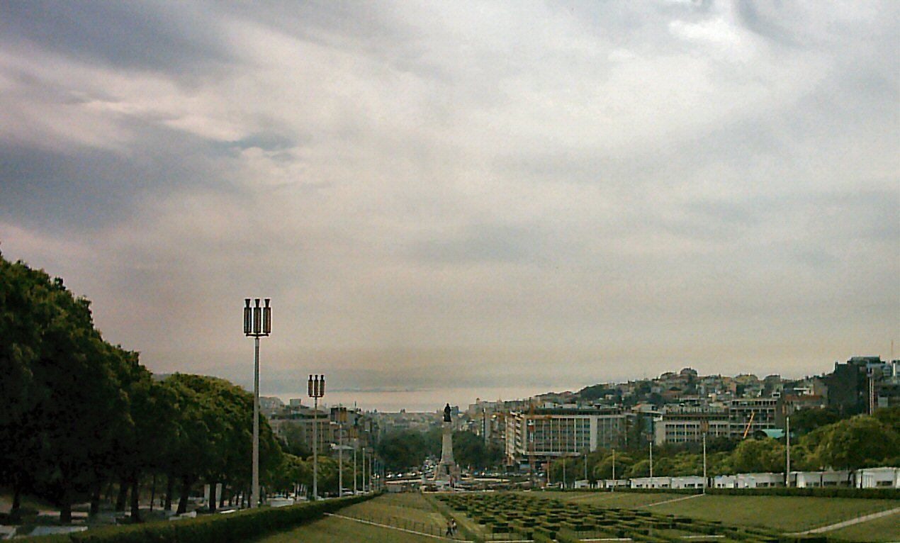 Vista de Lisboa, ao fundo a estátua e Praça do Marquês de Pombal